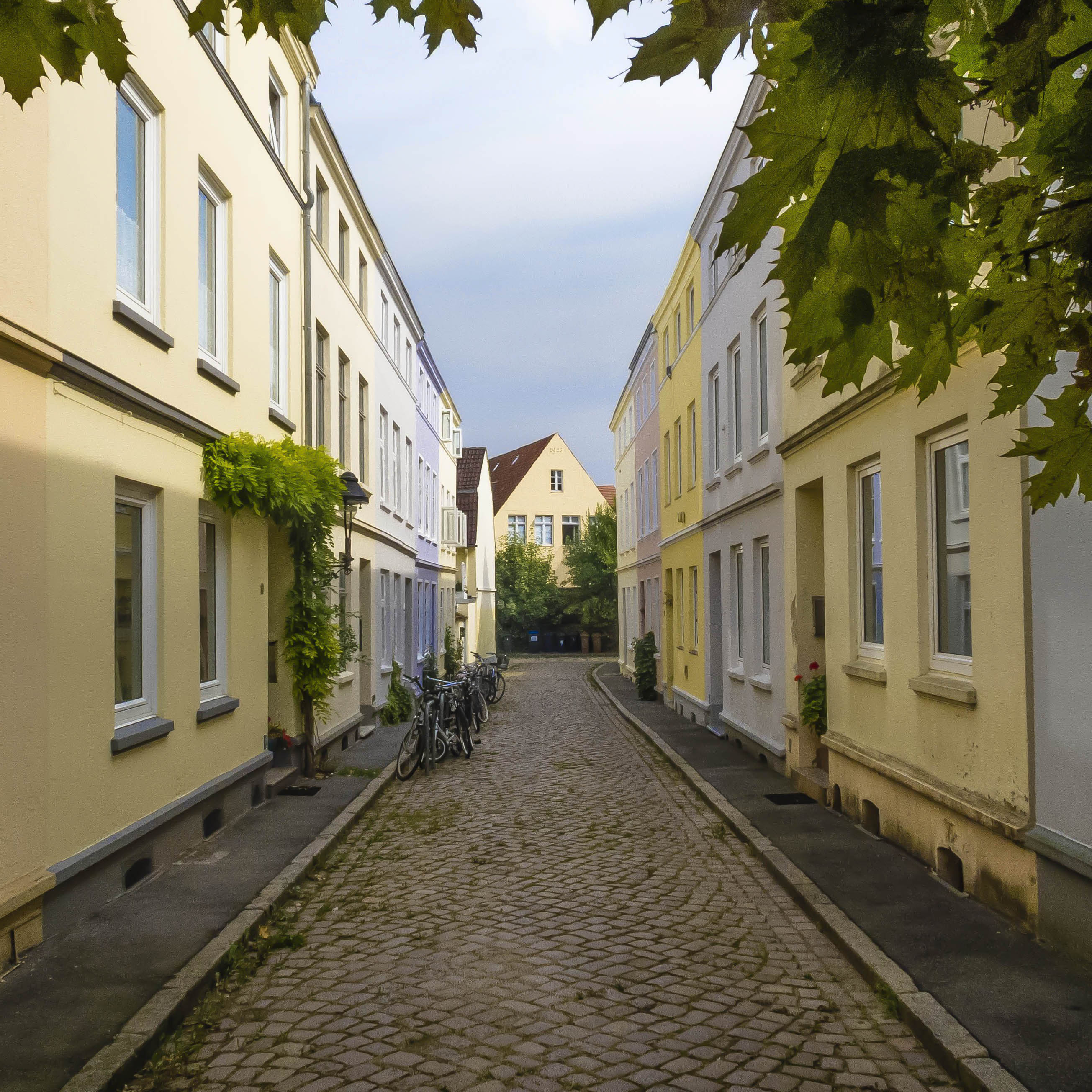 Steinstraße.